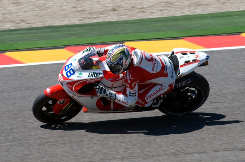 Mugello 2009 - Saturday, May 30 Niccolò Canepa, Ducati Desmosedici GP9 Qualifying: 13